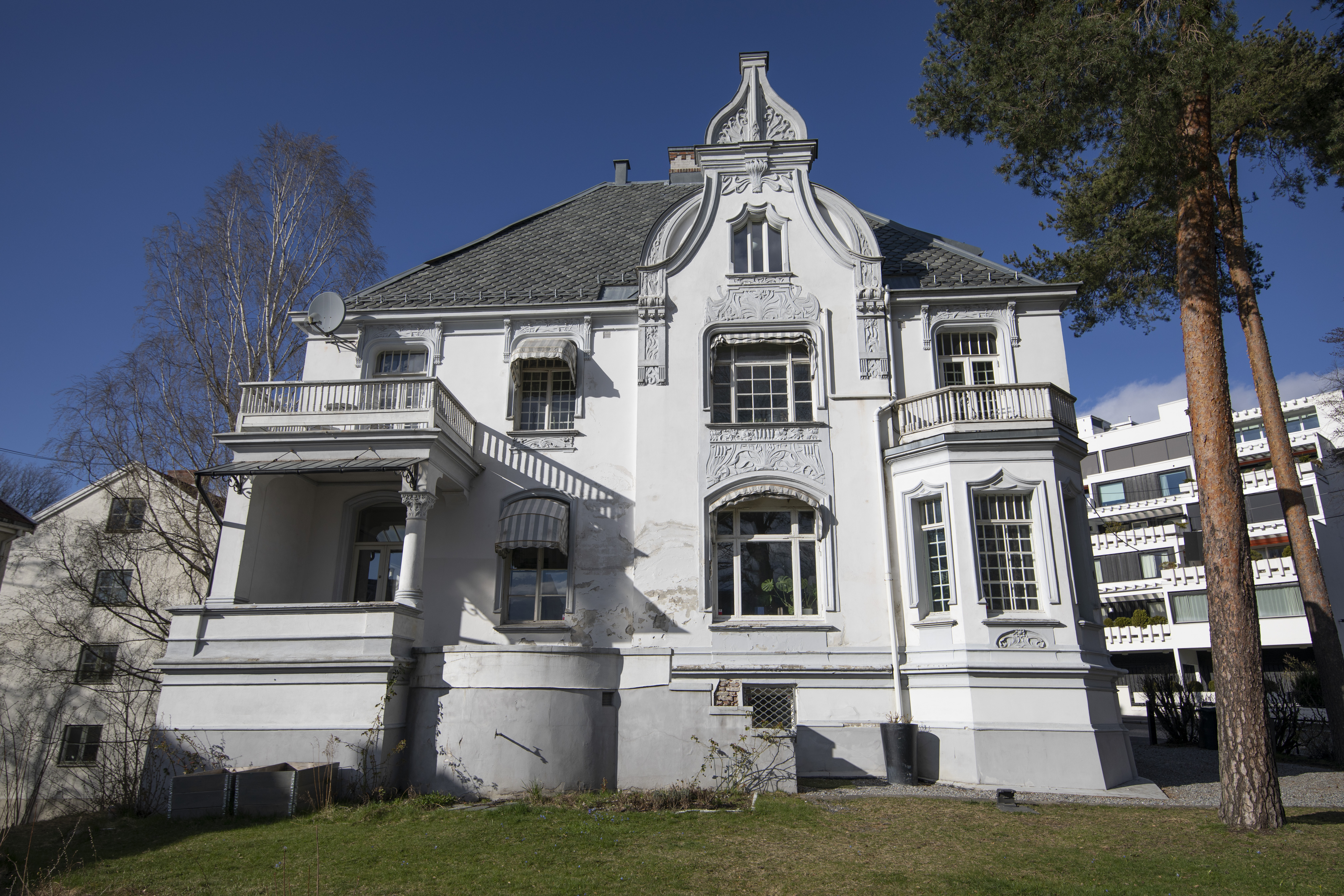 Villa Sult i Oslo